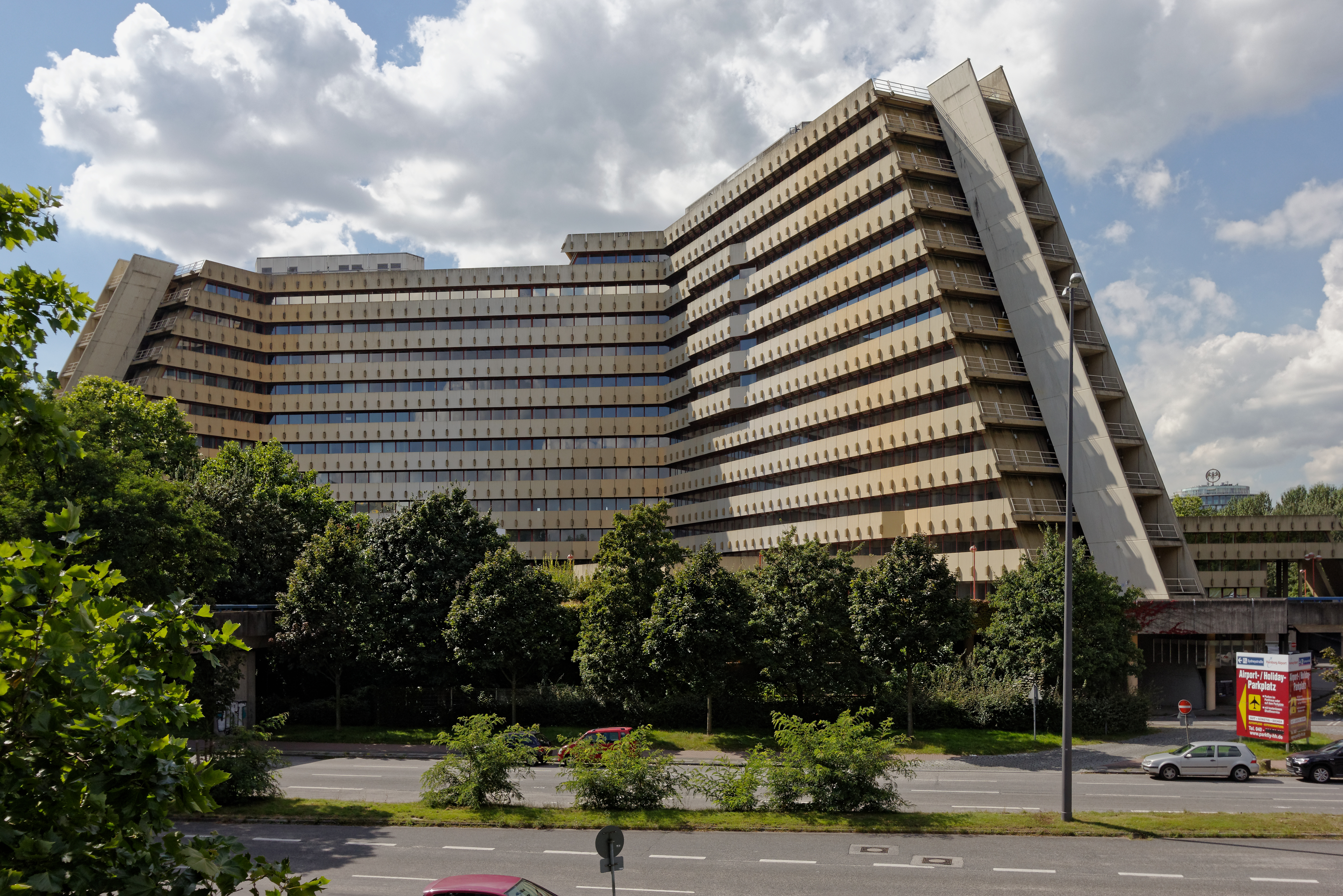 Hamburg-Winterhude, City Nord, Bürogebäude Überseering 30, ehemaliges Post-GebäudeThis is a photograph of an architectural monument.